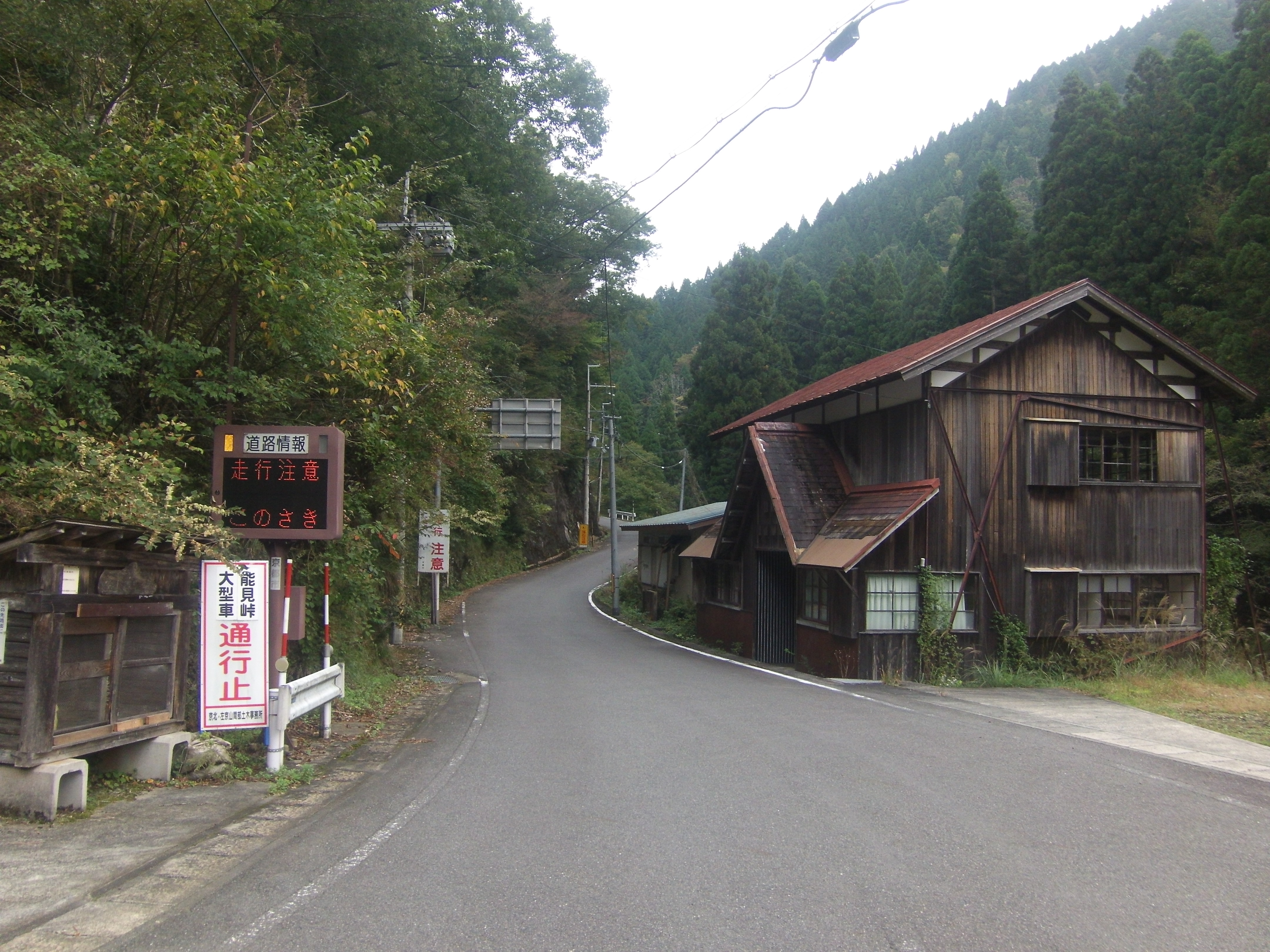 京都府道110号線の京都市左京区広河原杓子屋町側